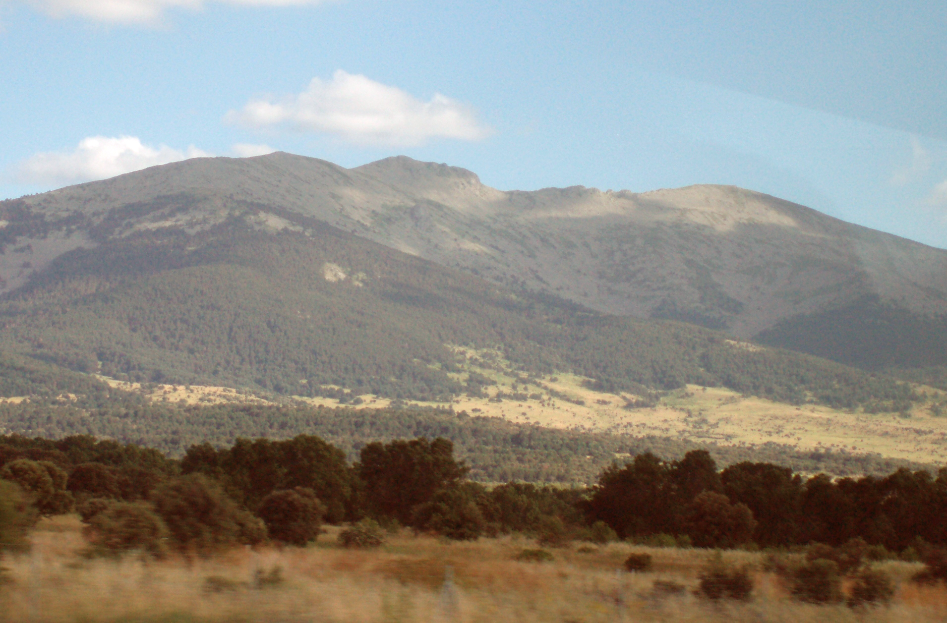 Vista de la sierra de La Mujer Muerta, uno de los cordales montañosos más elevados de la Sierra de Guadarrama (Provincia de Segovia, España). Está enteramente dentro de la provincia de Segovia y se comunica con la alineación principal de la sierra a través del puerto de la Fuenfría. Esta sierra recibe este peculiar nombre gracias a la silueta de una mujer tumbada que describen sus montañas al ser miradas desde la llanura segoviana, tal y como sucede con esta imagen. Hay dos leyendas que cuentan un orígen mitológico y mágico de esta línea montañosa.